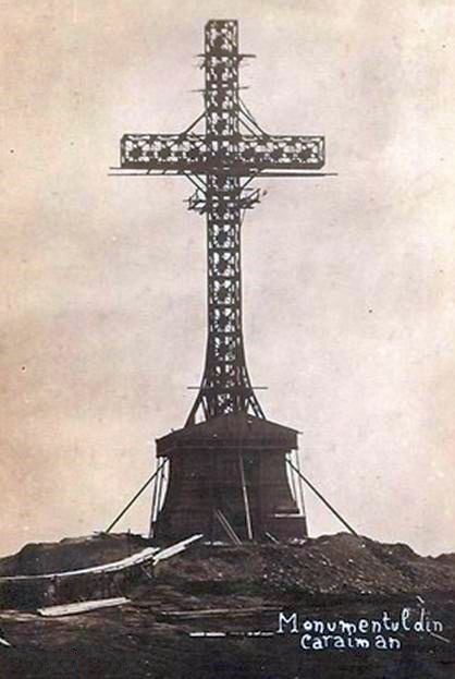 Crucea Eroilor de pe Muntele Caraiman in timpul constructiei - carte poștală nedatată